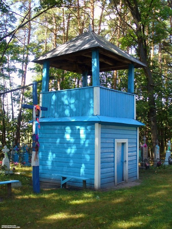 Калоднае. Царква Святога Дзімітрыя Салунскага